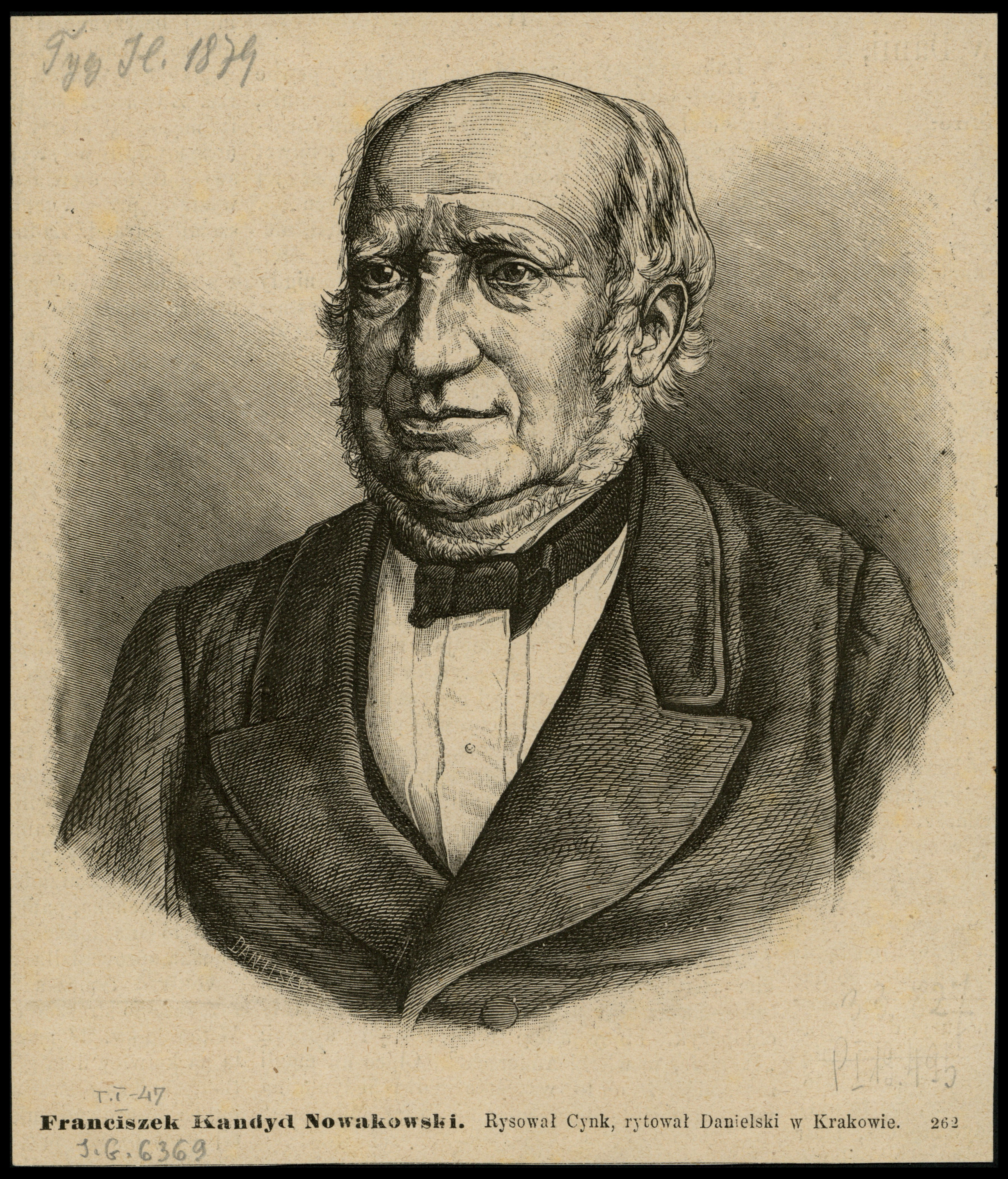 Franciszek Kandyd Nowakowski